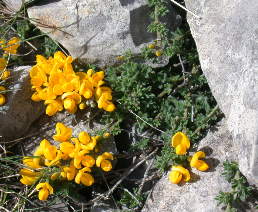 Cytisus ardoini